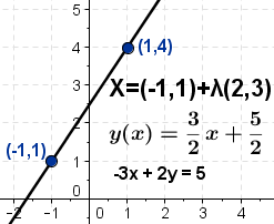 Линеарна функција параметарски облик